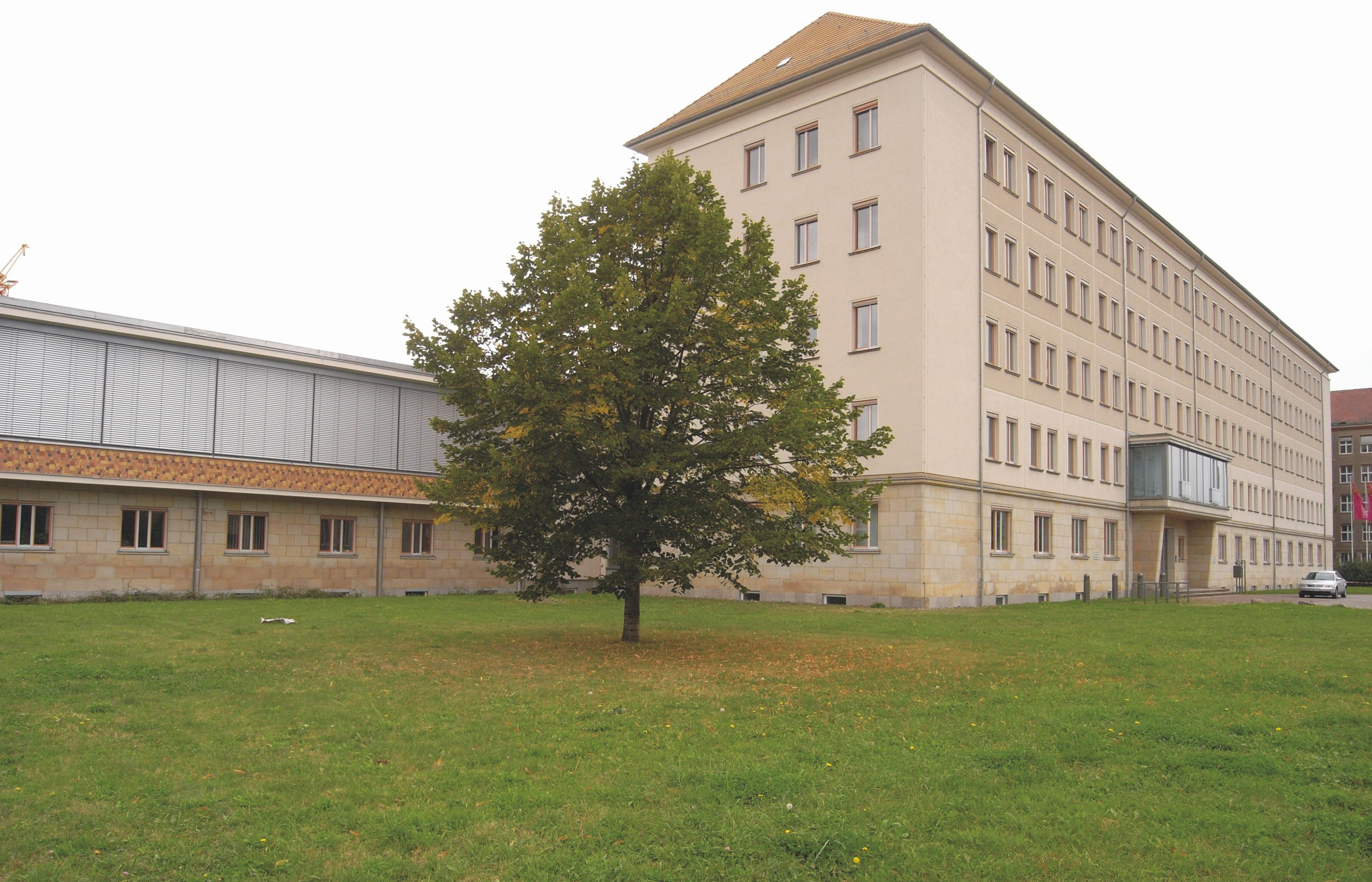 Gebäude der ehemaligen Wasserwirtschaftsdirektion des Bezirkes Dresden, Ostraallee (Sachsen, Deutschland)